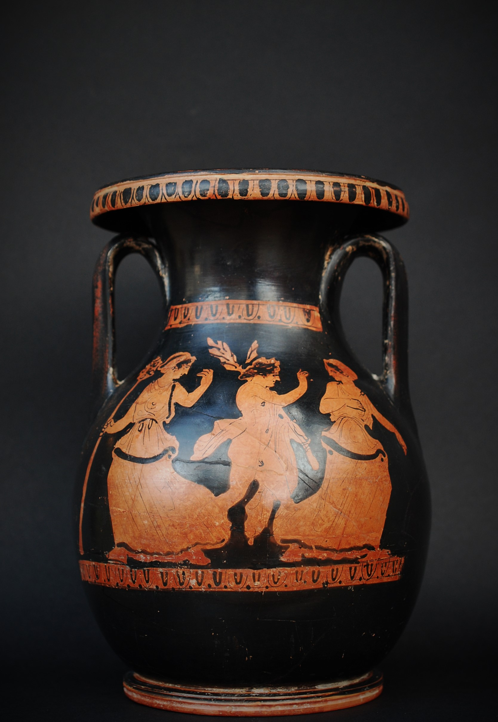 Peliké à figures rouges, IVème siècle avant notre ère